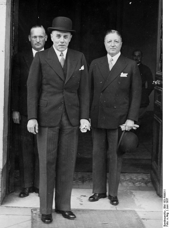 Hans Speidel, Ludwig Beck, Erich v. Kühlenthal Zentralbild Der Chef des deutschen Generalstabes General Ludwig Beck besucht im Juni 1937 die Pariser Weltausstellung und wird auch eine Unterredung mit dem französischen Generalstabschef General Gamilin haben. UBz: Oberst Speidel (links), General Beck (Mitte) und Generalleutnant Kühlenthal, der Militär-Attaché an der deutschen Botschaft in Paris beim Verlassen des französischen Kriegsministeriums nach der Unterredung mit General Gemelin. 7860-37 [Frankreich, Paris.- vlnr: Oberst Hans Speidel, General Ludwig Beck, Generalleutnant Erich von Kühlenthal] Abgebildete Personen: Beck, Ludwig: Generaloberst, Heer, 20.7.1944 hingerichtet, Deutschland Speidel, Hans Dr.: General, Oberkommandierender NATO-Streitkräfte Mitteleuropa, Bundesrepublik Deutschland (PND 118616013) Kühlenthal, Erich von: General, Militärattaché in Frankreich, Deutschland